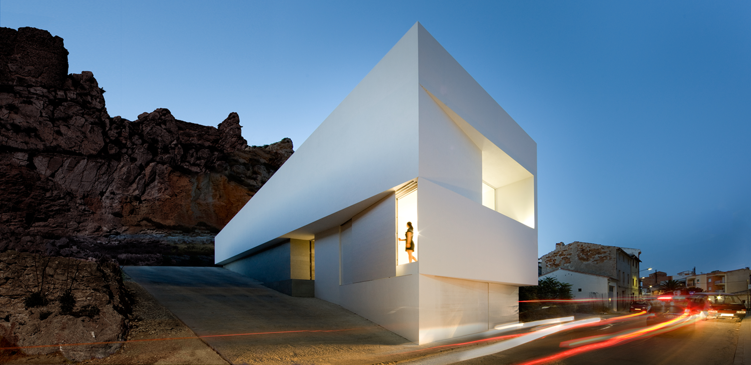 Casa en la ladera del castillo de Ayora, al inicio de la calle Obispo Pérez. Obra de Fran Silvestre Arquitectos